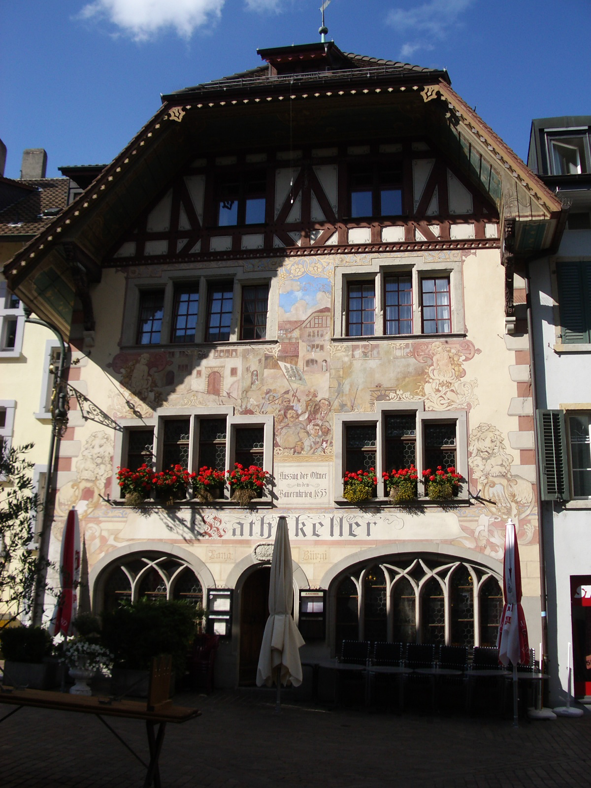 Der Rathskeller in Olten (Schweiz). Das Gebäude stammt von 1673 und steht am Rande der Altstadt, an Stelle der ehemaligen Ringmauer. Es war ursprünglich der Gaststall der Herberge "zum Löwen", im späteren 19. Jh. zu einem Wohnhaus umgebaut mit Versatzstücken der ehemaligen Fassade des "Löwen". Ein Restaurant ist das Gebäude seit 1896 (zunächst unter dem Namen "Baselbieter"), umgebaut und "historisierend" ausgestattet 1905-6, seit damals "Rathskeller". Das Gebäude heisst auch "Kübel" (dialektal Chöbu, Chübu).[1] Die Fresken auf der Fassade sind von Emil Kniep (1906). Auf der vorderen Fassade "Auszug der Oltner in den Bauernkrieg 1653", rückseitig "Der letzte Frohburger" (s. File:Olten04.jpg) [2]